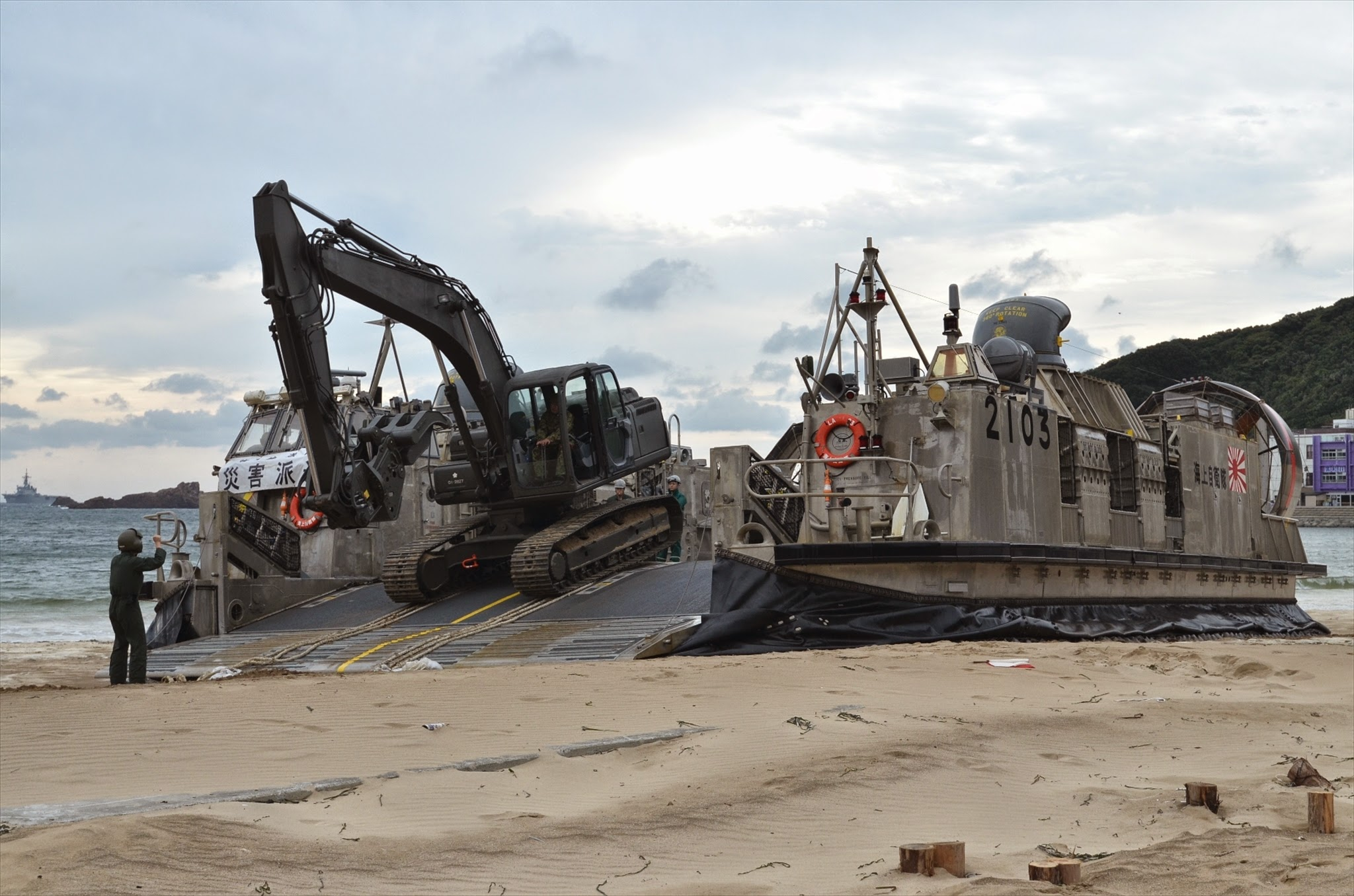 油圧ショベル（静岡県・加茂地区総合防災訓練・第１施設団）